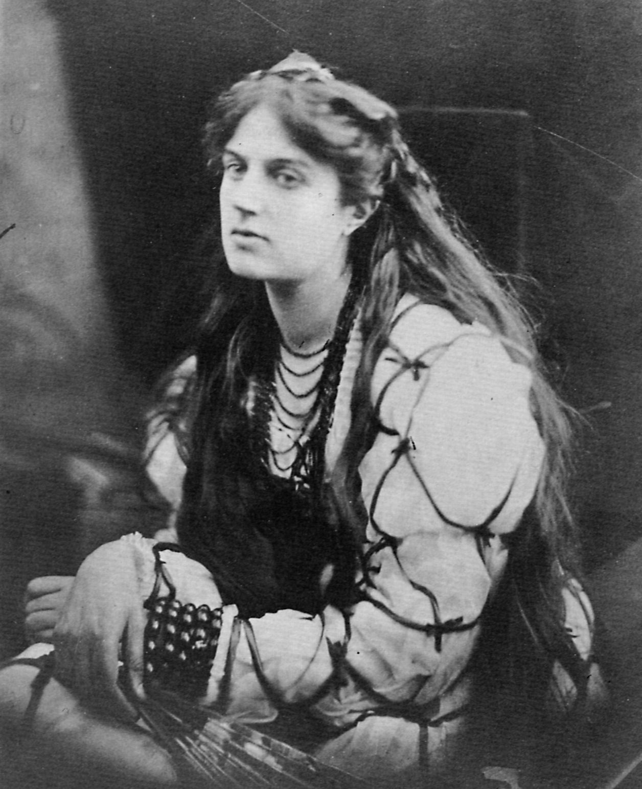 Cameron, Julia Margaret: Hypatia